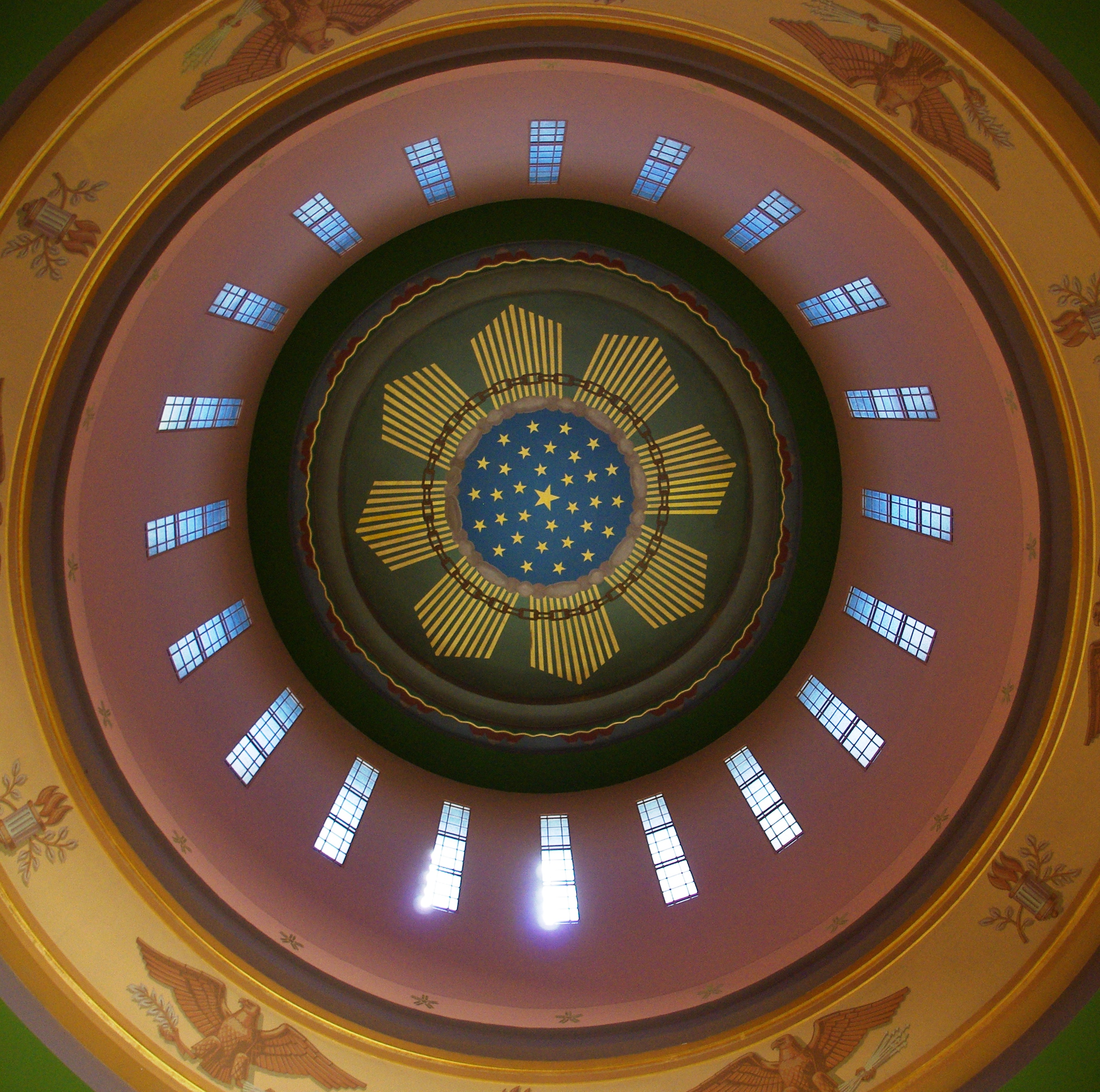 Oregon State Capitol rotunda